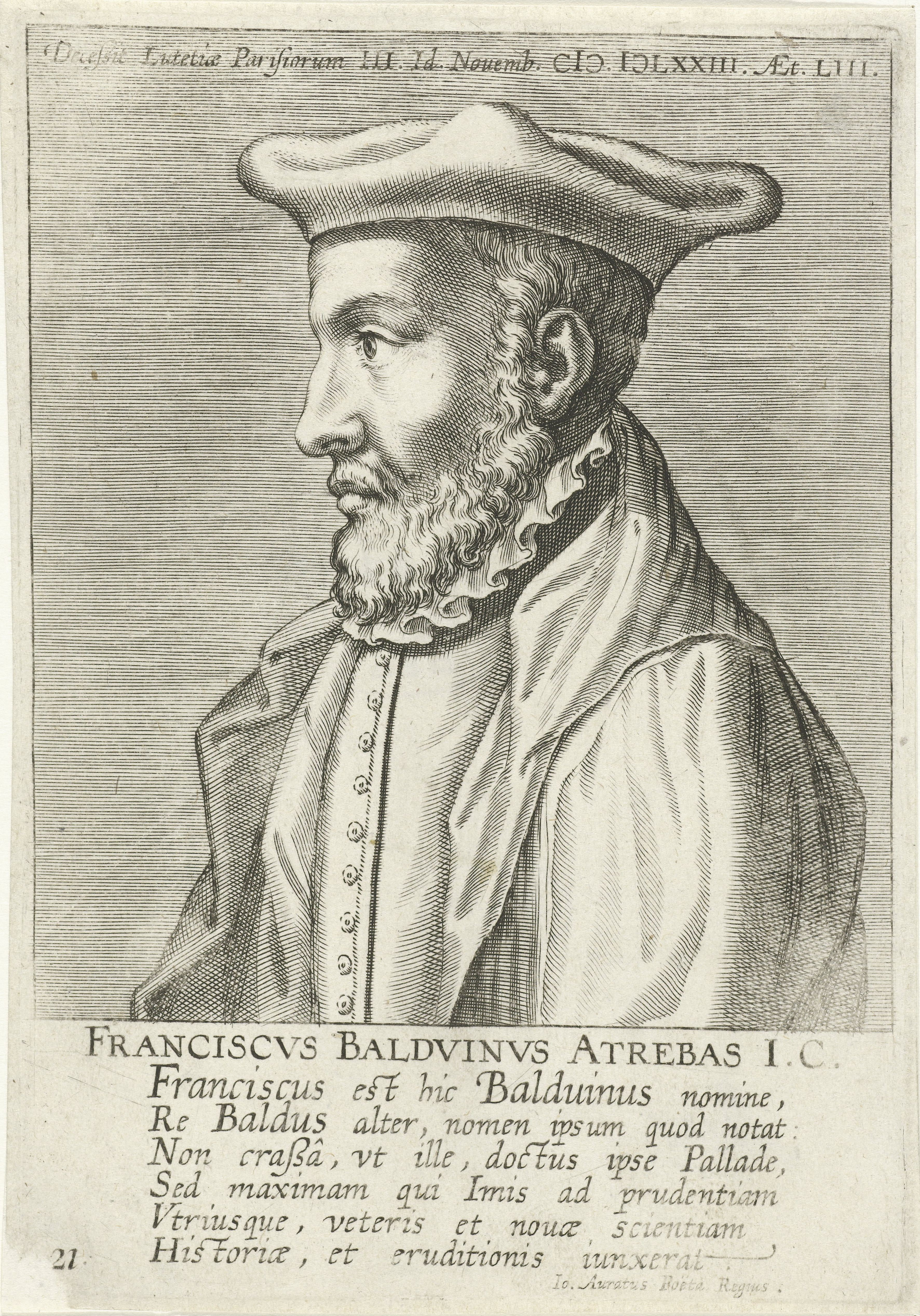 IdentificatieTitel(s): Portret van François BaudoinFranciscvs Baldvinvs Atrebas I.C. (titel op object)Portretten van beroemde Nederlandse en Vlaamse geleerden (serietitel)Illustrium Galliae Belgicae scriptorum icones et elogi (serietitel)Objecttype: prent Serienummer: 21/51Objectnummer: RP-P-1910-4309Catalogusreferentie: New Hollstein Dutch fig. 12Opschriften / Merken: verzamelaarsmerk, verso midden, gestempeld: Lugt 2228Omschrijving: Portret van François Baudoin, Franse jurist en theoloog. Buste naar links. De prent heeft een Latijns boven- en onderschrift en maakt deel uit van een serie van beroemde Nederlandse en Vlaamse geleerden.VervaardigingVervaardiger: prentmaker: Philips Galle (toegeschreven aan atelier van)schrijver: Io. Auratus (vermeld op object)uitgever: Philips Galle (toegeschreven aan)uitgever: C. Galle (toegeschreven aan)Plaats vervaardiging: AntwerpenDatering: 1604Fysieke kenmerken: gravureMateriaal: papier Techniek: graveren (drukprocedé)Afmetingen: plaatrand: h 155 mm × b 108 mmOnderwerpWie: François BaudouinVerwerving en rechtenVerwerving: aankoop 1905Copyright: Publiek domein